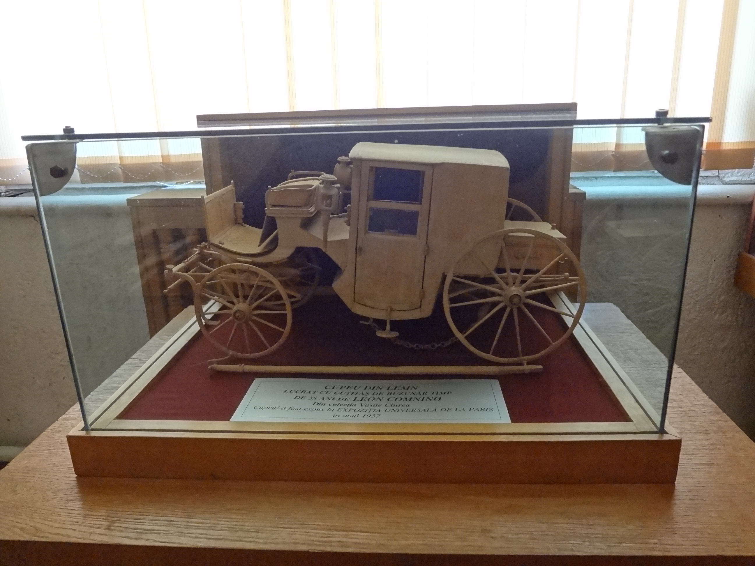 Falticeni sculpture en bois realisee par leon comnino achetee par vasile ciurea